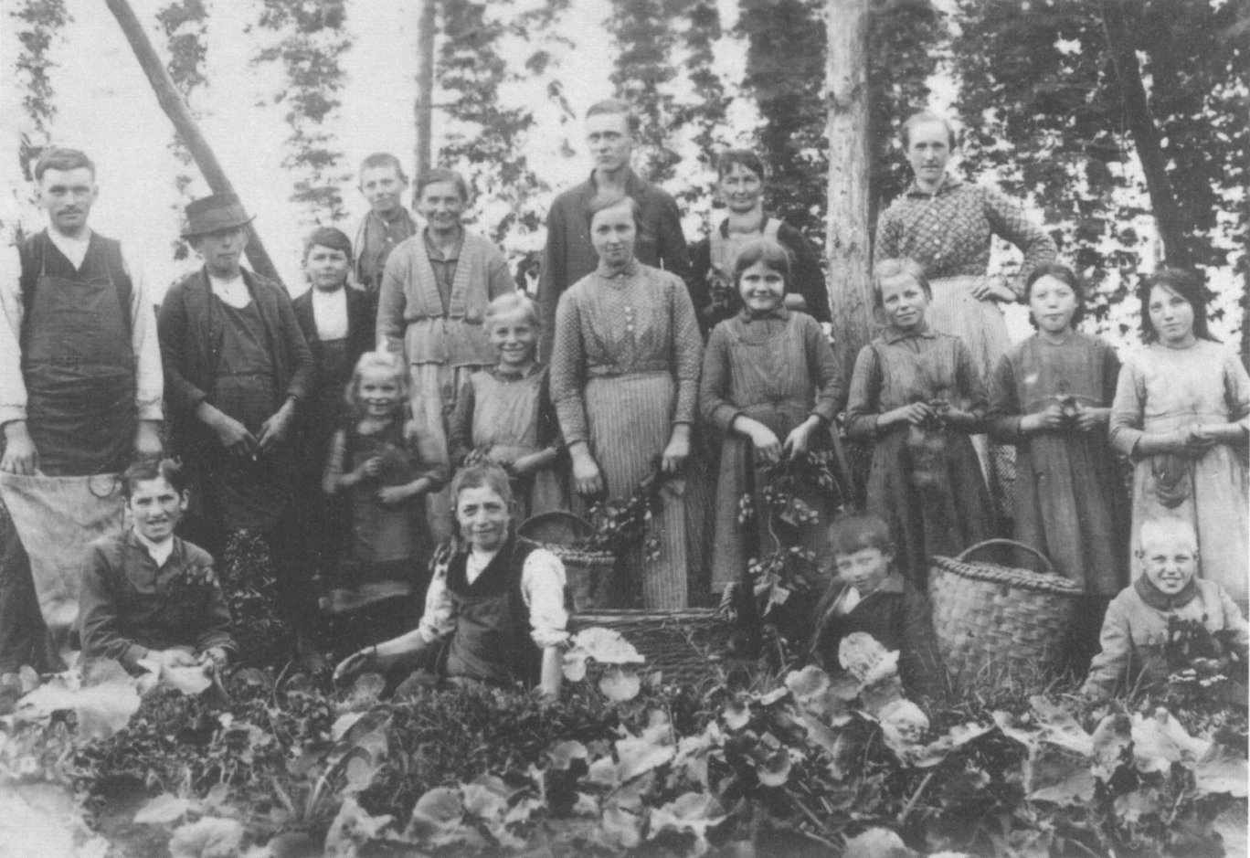 Hopfenzupfer bei der Ernte in der Hallertau, ca. 1930